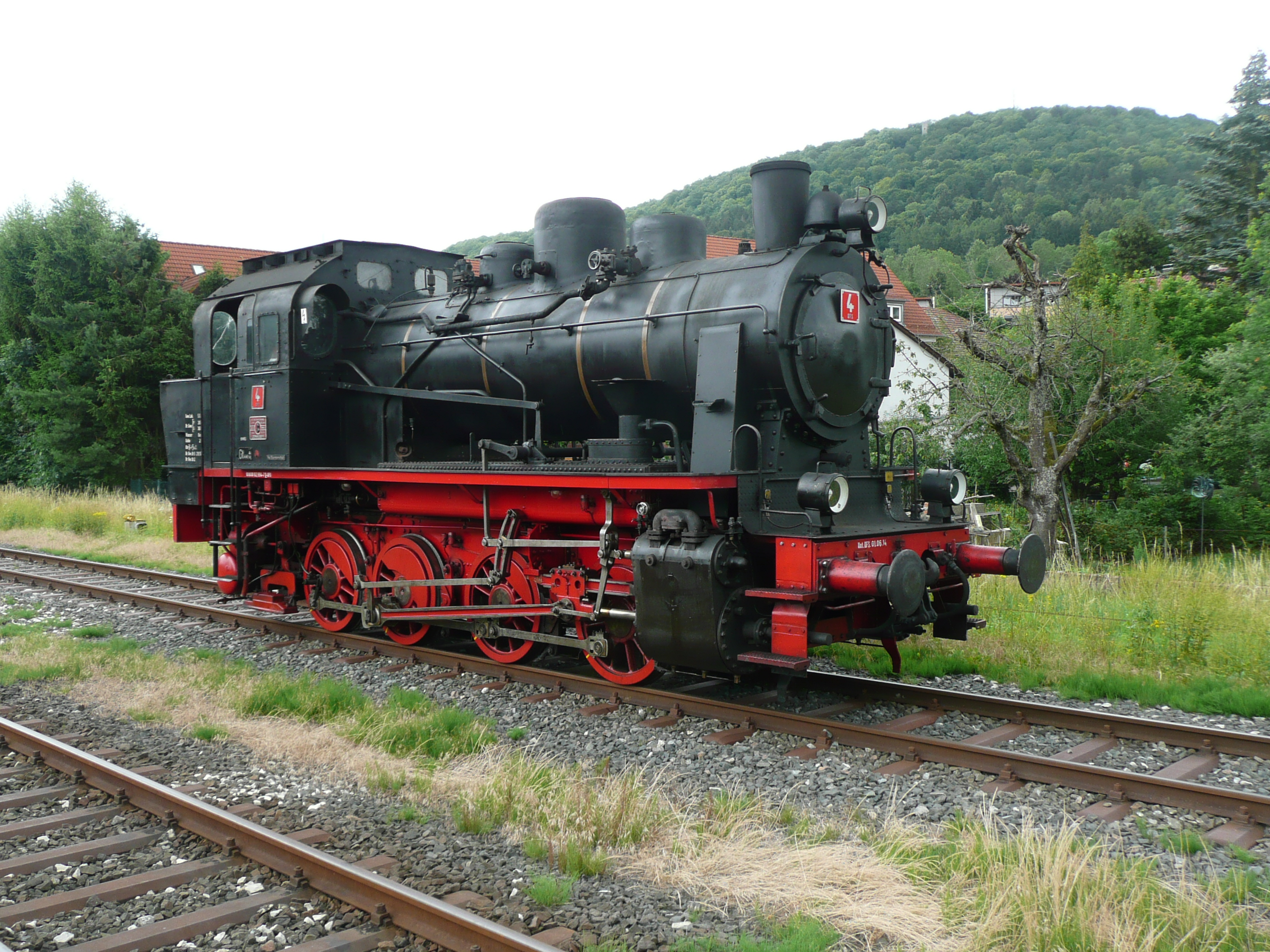 Dampflok ELNA6 in Ebermannstadt